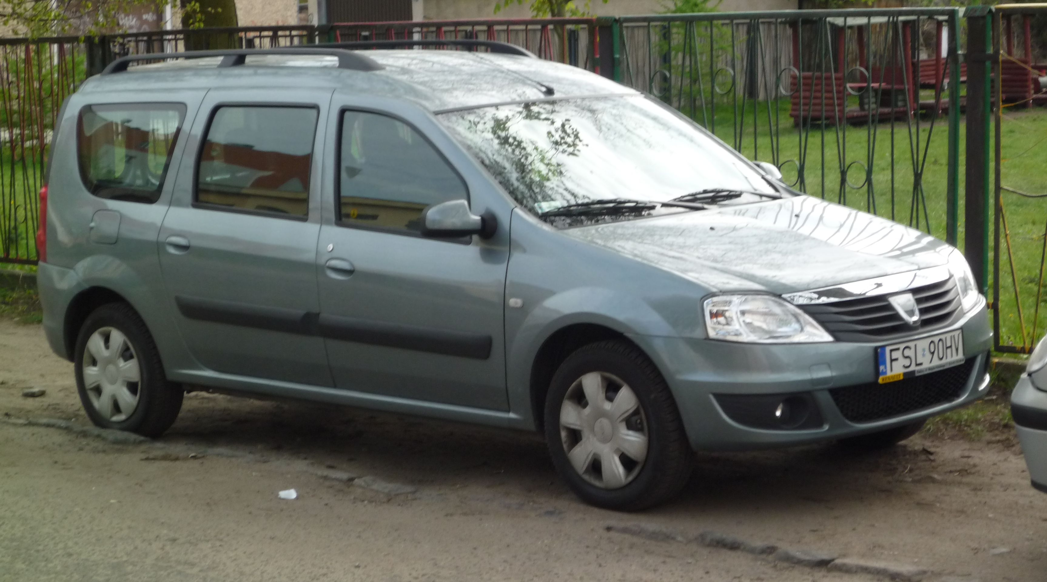 Dacia Logan MCV w Słubicach.